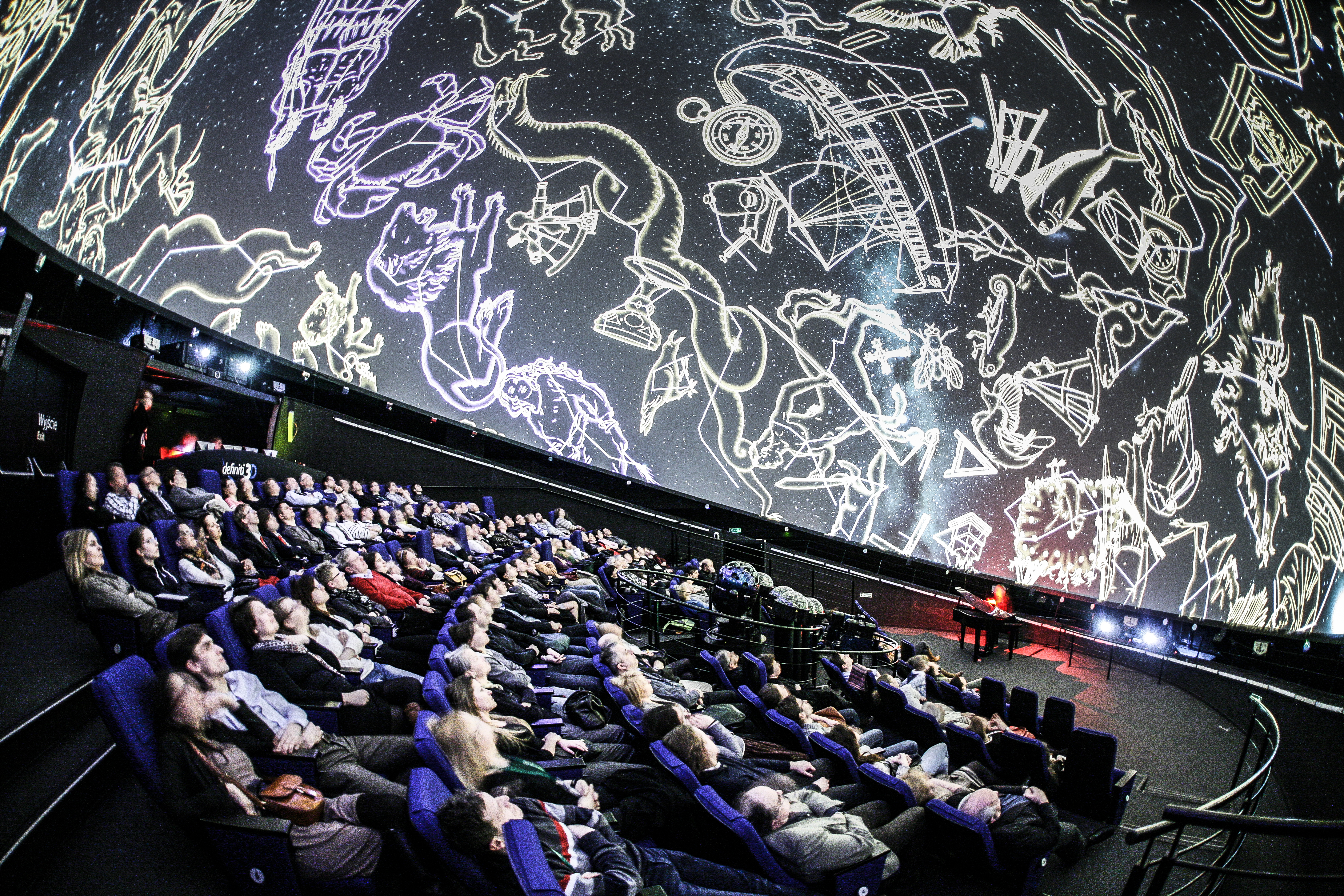 Planetarium Niebo Kopernika - Centrum Nauki Kopernik w Warszawie, fot. W.Surdziel. Archiwum CNK, współpraca ze Stowarzyszeniem Wikimedia Polska, wikiprojekt.